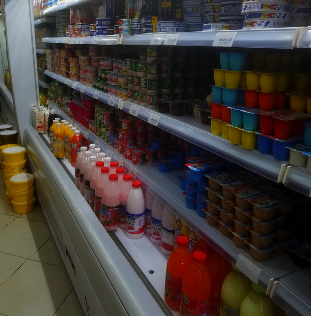 Denrées alimentaires (Produits laitiers) disponibles dans une supérette en Algérie.